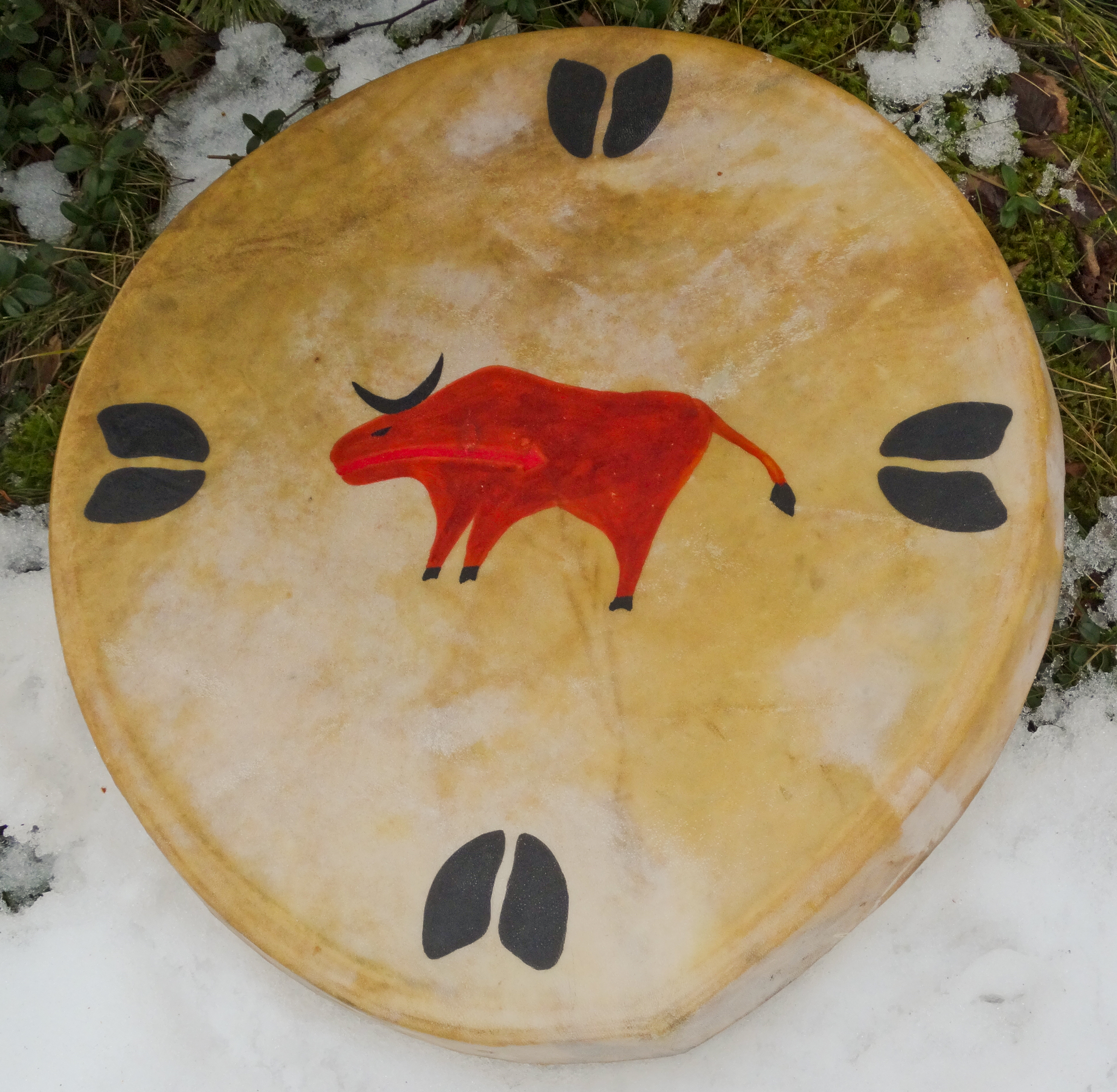 Buffalo Thunderdrum Zeremonialtrommel der Plainsindianer